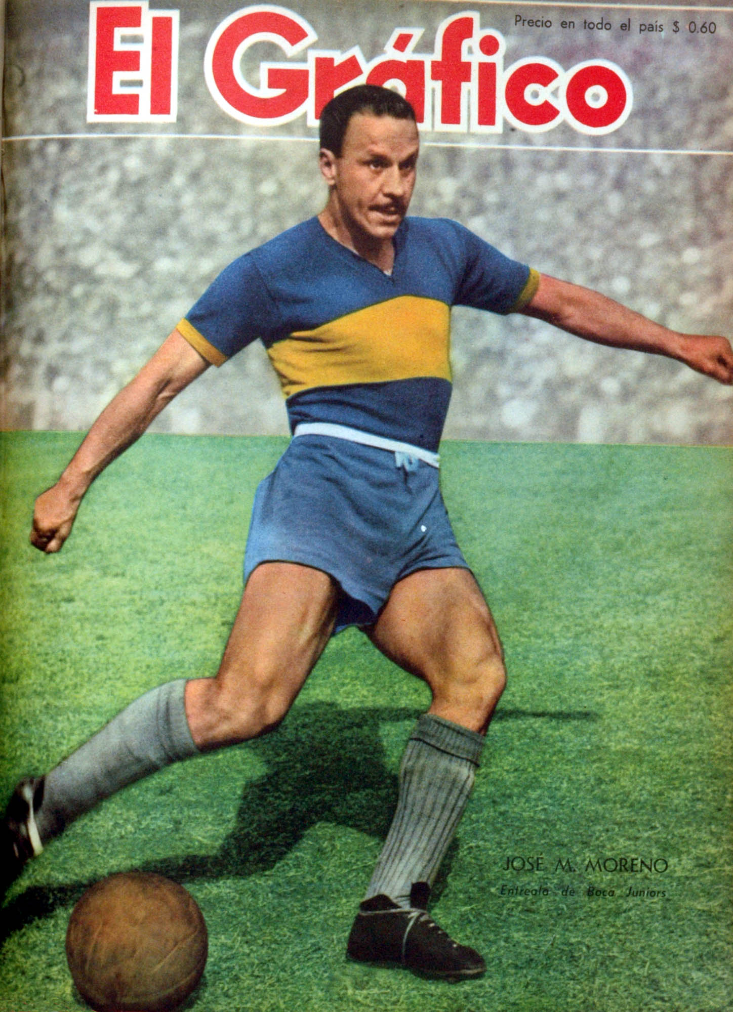 El Grafico del 22 de Septiembre de 1950. Edicion 1624